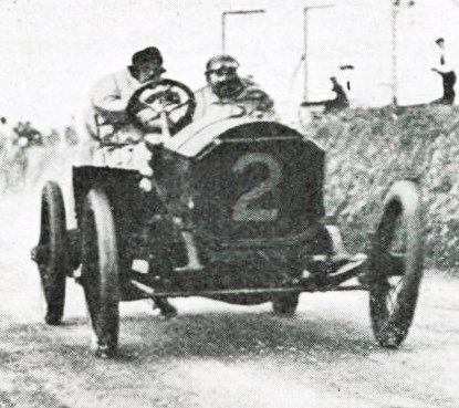 William Watson, vainqueur du Tourist Trophy 1908 (La Vie au Grand Air du 17 octobre 1908, p.273)